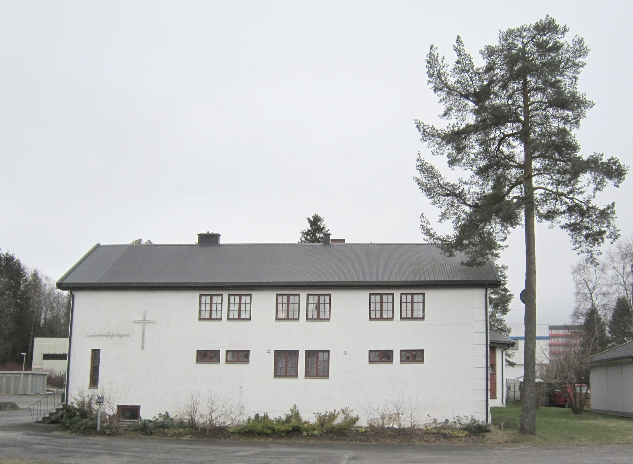 Salemkirken Lørenskog